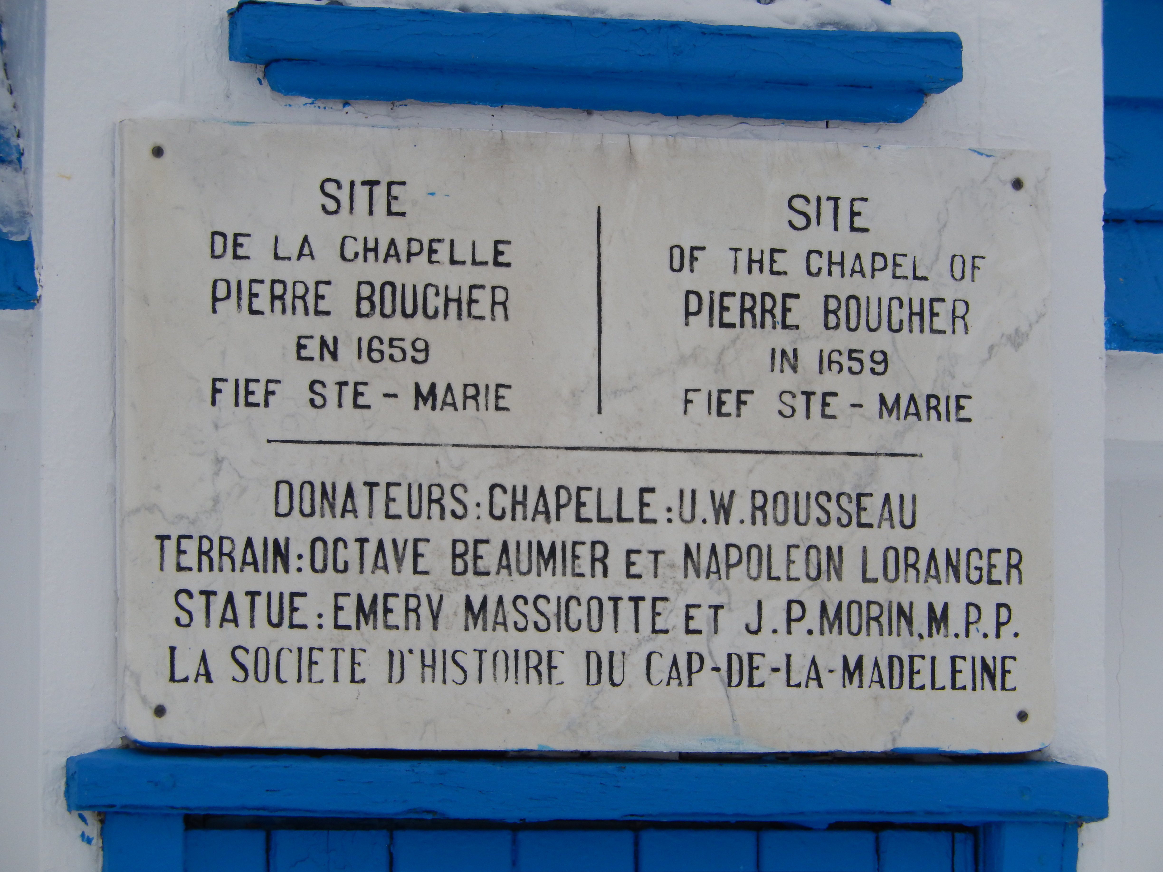 Chapelle commémorant la première chapelle construite par Pierre Boucher au fief Sainte-Marie en 1659. La chapelle a été construite en 1940.